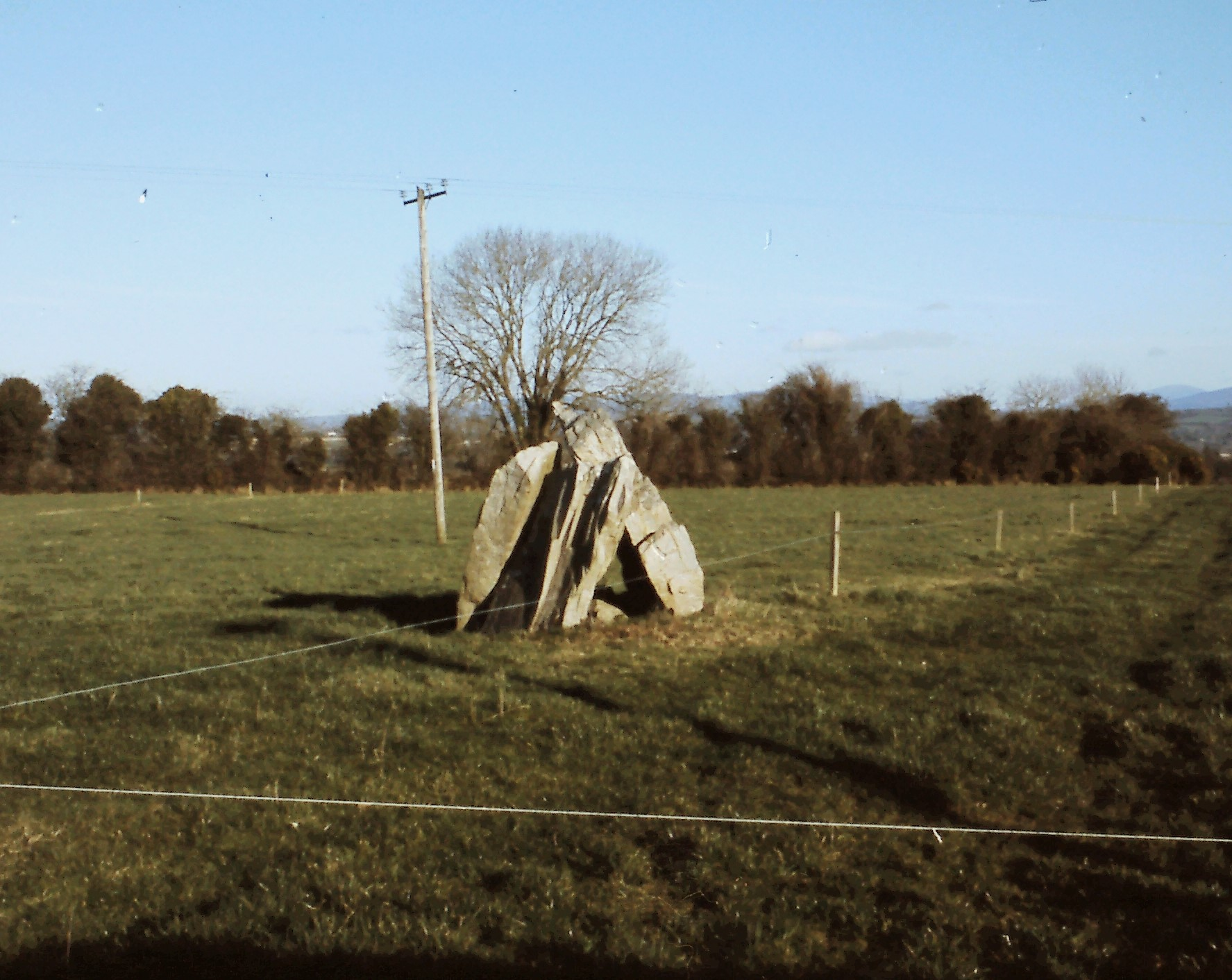 Newmarket - Portal Tomb